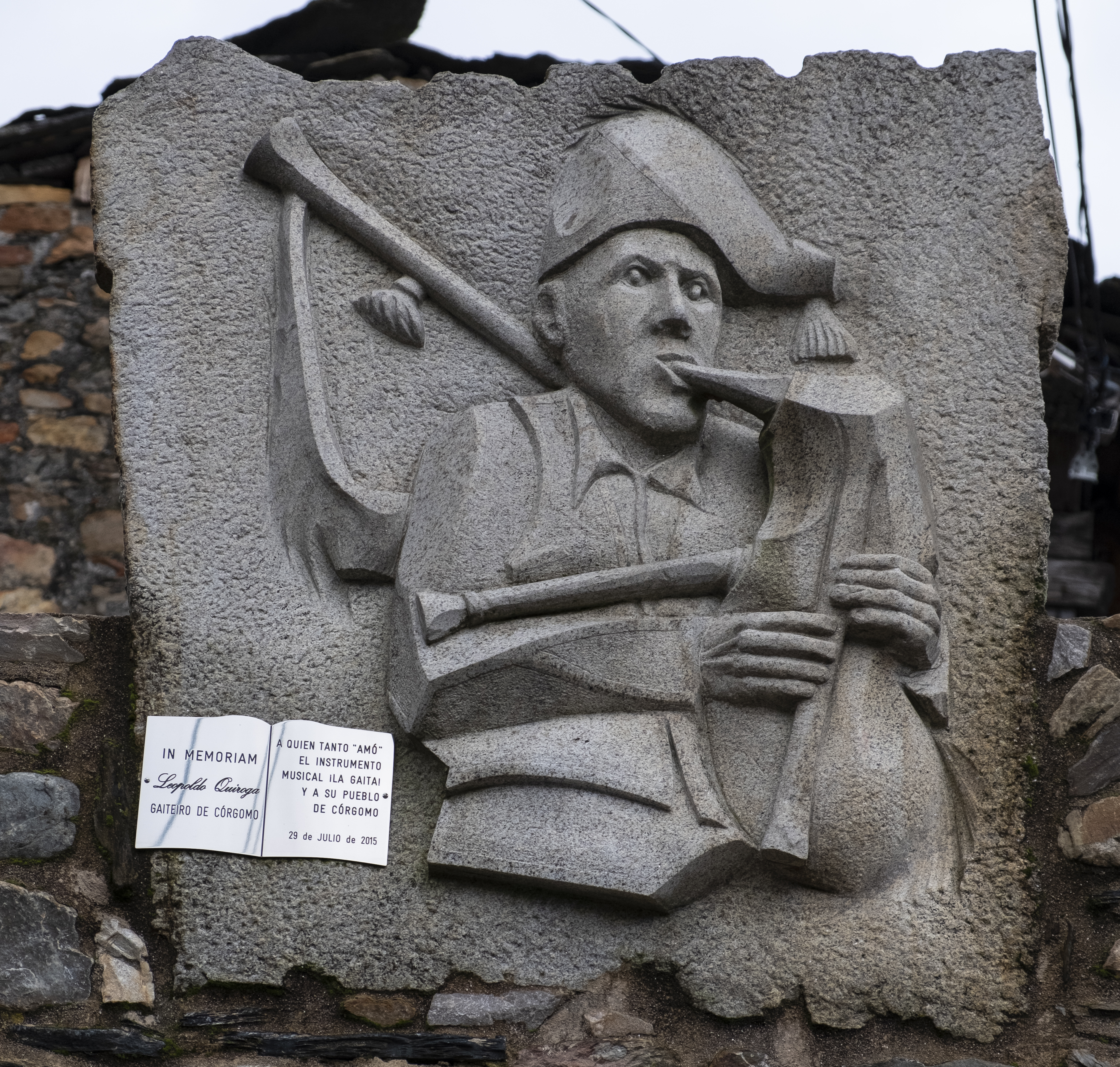 Detalle na fonte de Córgomo, Vilamartín de Valdeorras